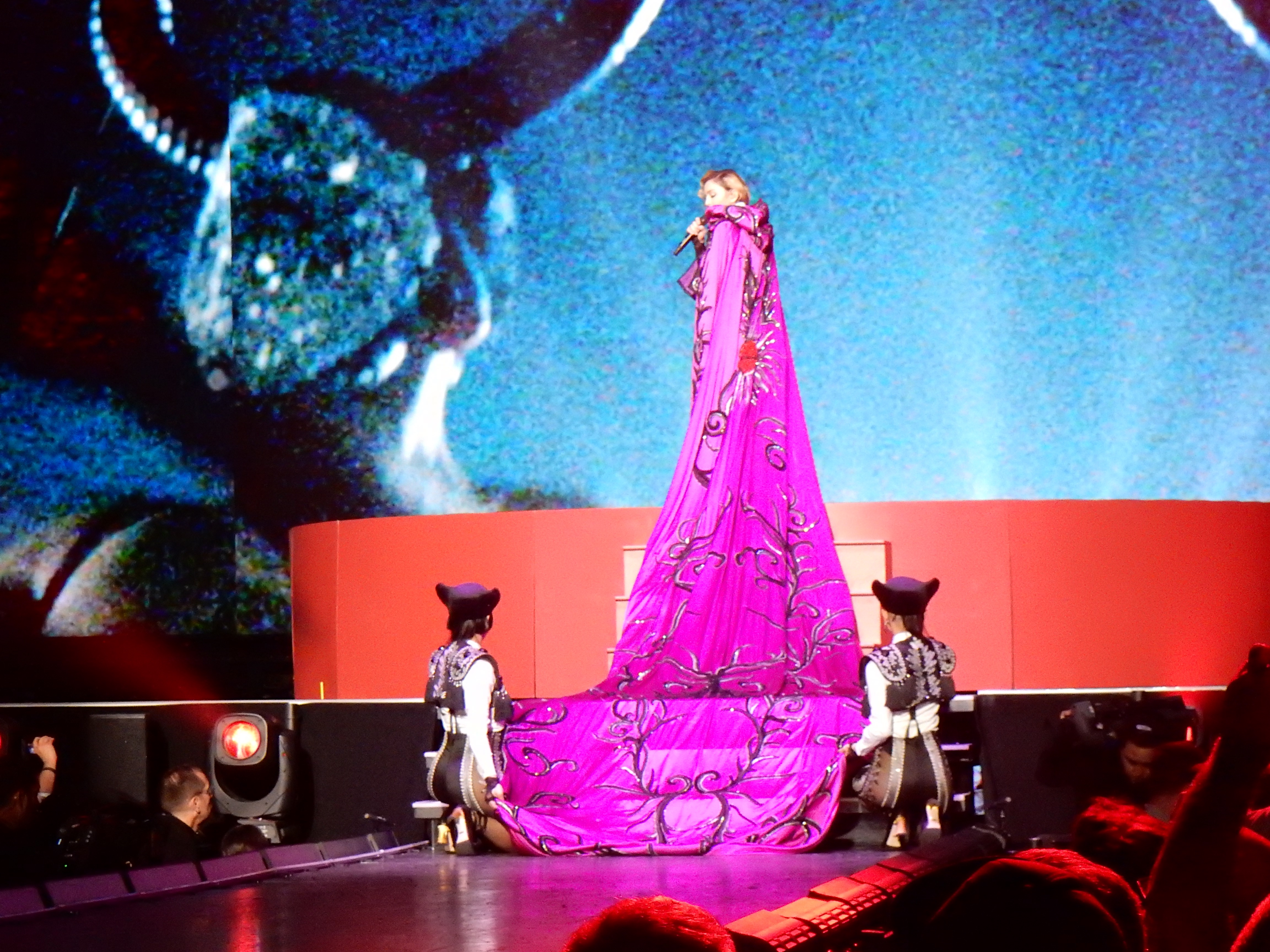 Madonna - Rebel Heart Tour Cologne 2